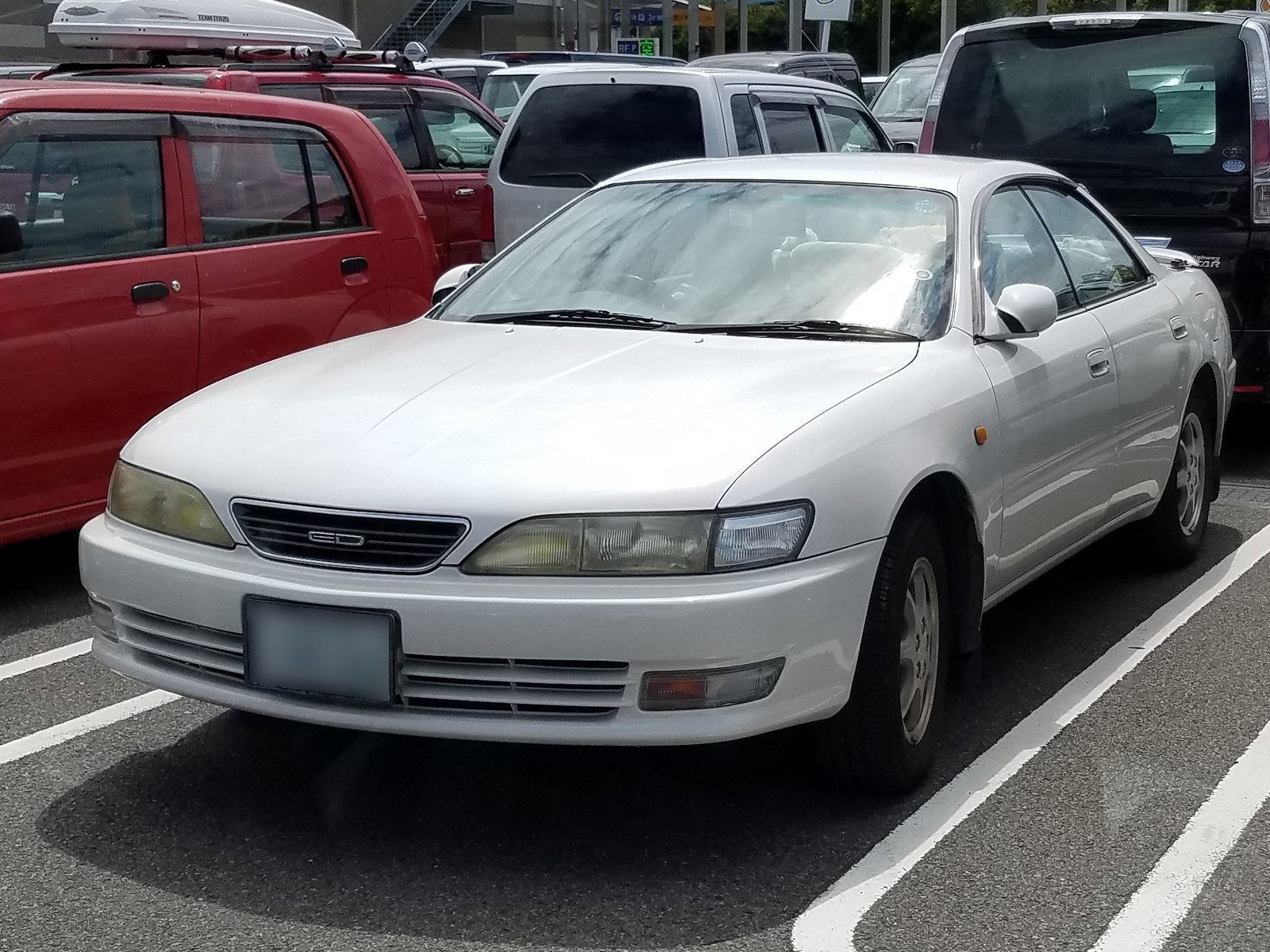 カリーナED X エキサイティングバージョン装着車（後期型）